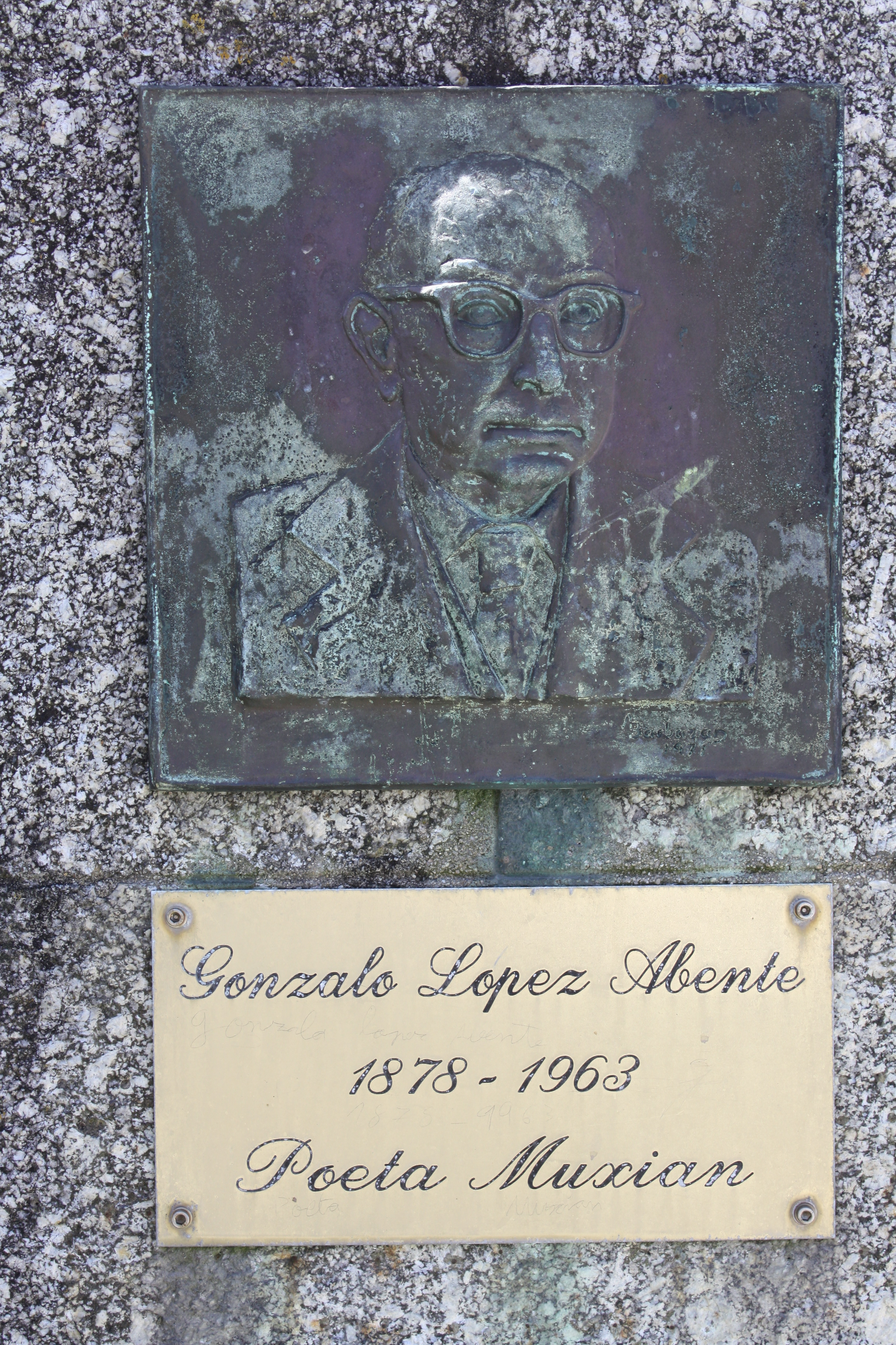 Placa na honra do poeta Gonzalo López Abente (1878-1963), en Muxía (A Coruña)